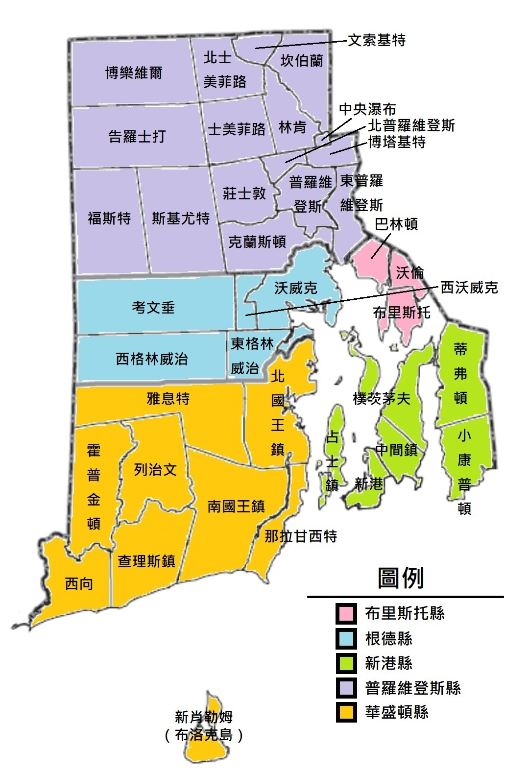 中文（香港）: 羅德島州市鎮。